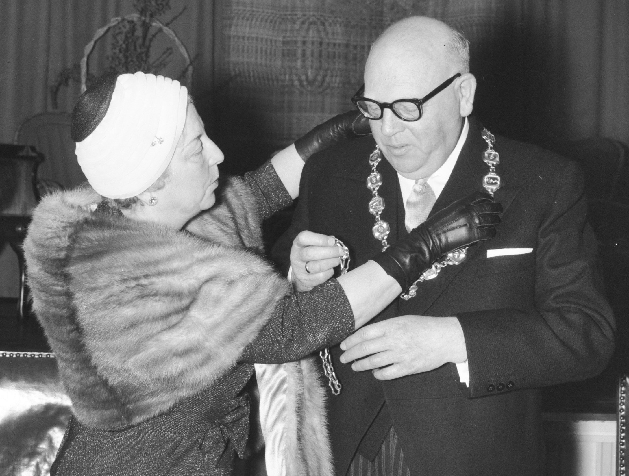 Collectie / Archief : Fotocollectie Anefo Reportage / Serie : [ onbekend ] Beschrijving : Burgemeester C. M. A. Koot van Uithoorn viert zijn 25-jarig ambtsjubileum, namens de raad hangt zijn vrouw e nieuwe ambtsketen om Datum : 16 februari 1960 Locatie : Noord-Holland, Uithoorn Trefwoorden : VROUW, ambtsjubilea, ambtsketens, burgemeesters Persoonsnaam : C. M. A. Koot Fotograaf : Sterling, […] / Anefo Auteursrechthebbende : Nationaal Archief Materiaalsoort : Negatief (zwart/wit) Nummer archiefinventaris : bekijk toegang 2.24.01.04 Bestanddeelnummer : 911-0340